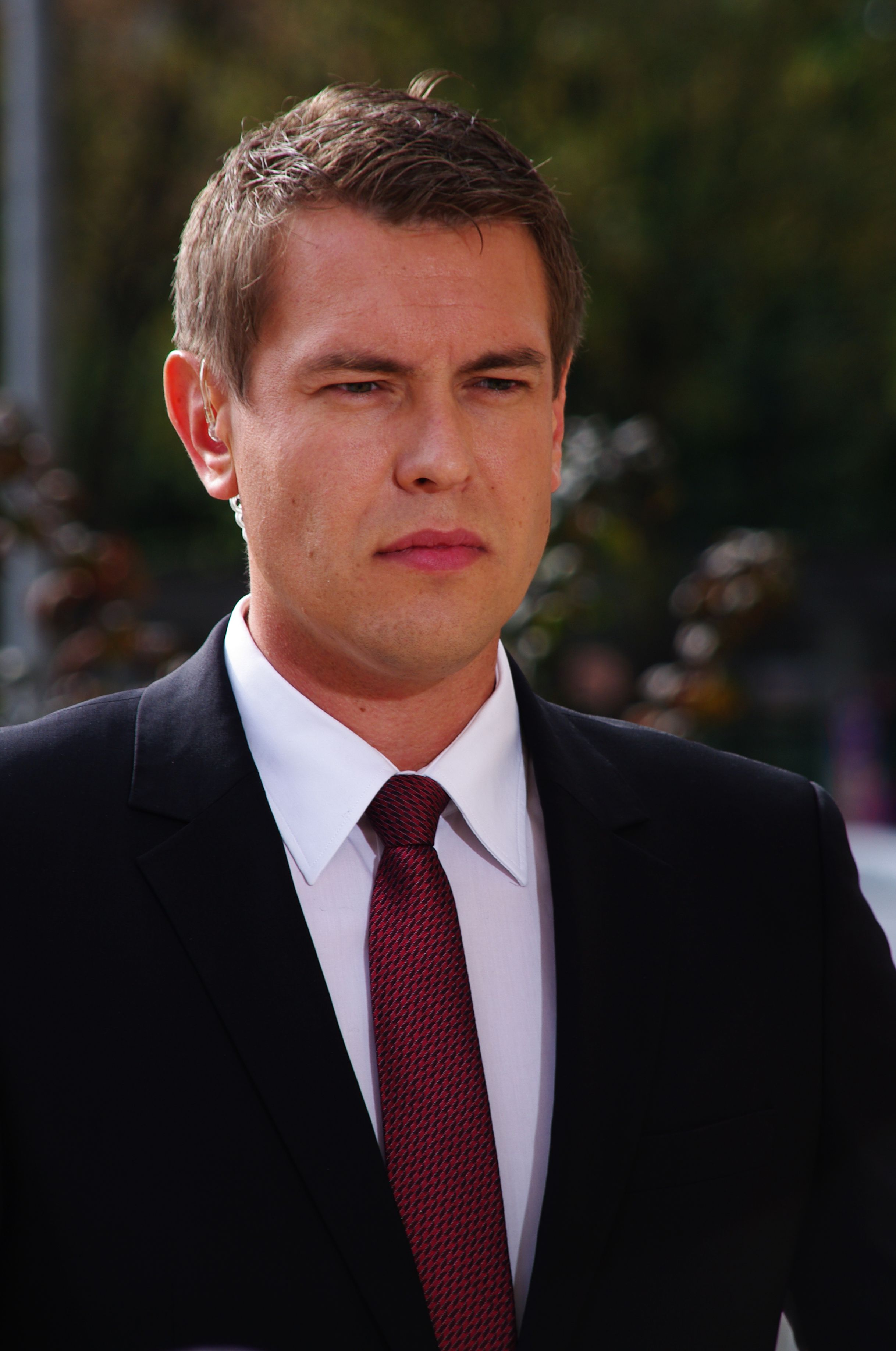 Gunnar Breske für den Fernsehsender Das Erste vor dem Landgericht Erfurt am Domplatz anlässlich des Papstbesuchs 2011.